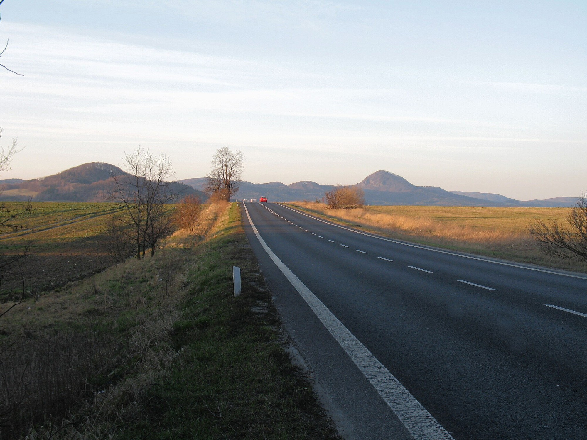 Silnice I/9 u Častolovic mezi Českou Lípou a Novým Borem, na obzoru je vrch Klíč v Lužických horách (759 m n. m.)